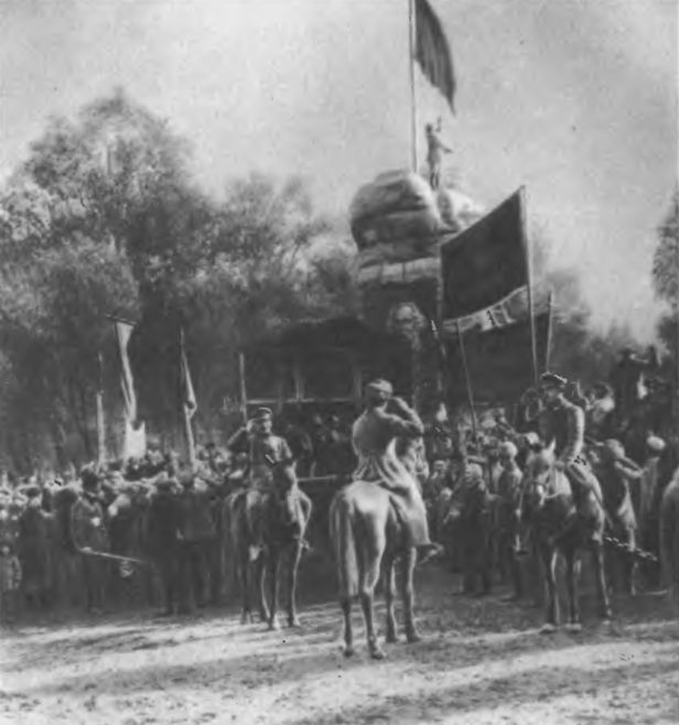 Поднятие Красное знамени в честь провозглашения Советской власти в Ташкенте 12 сентября 1917 г